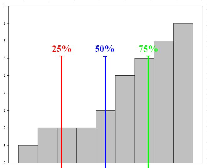 Histogram, indikating 25%, 50% and 75%